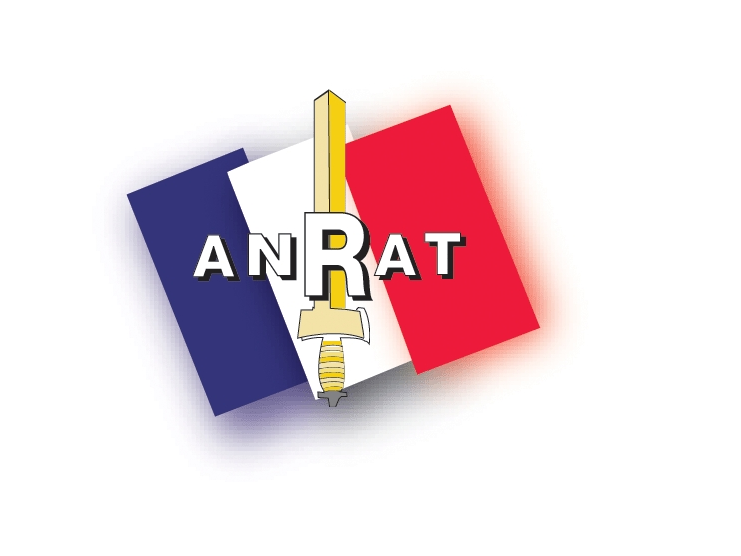 Drapeau national français Sigle Association nationale des réserves de l'armée de terre (ANRAT) Glaive symbole de l'armée de Terre française